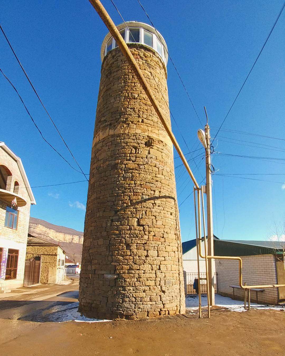 Минарет в с. Хив